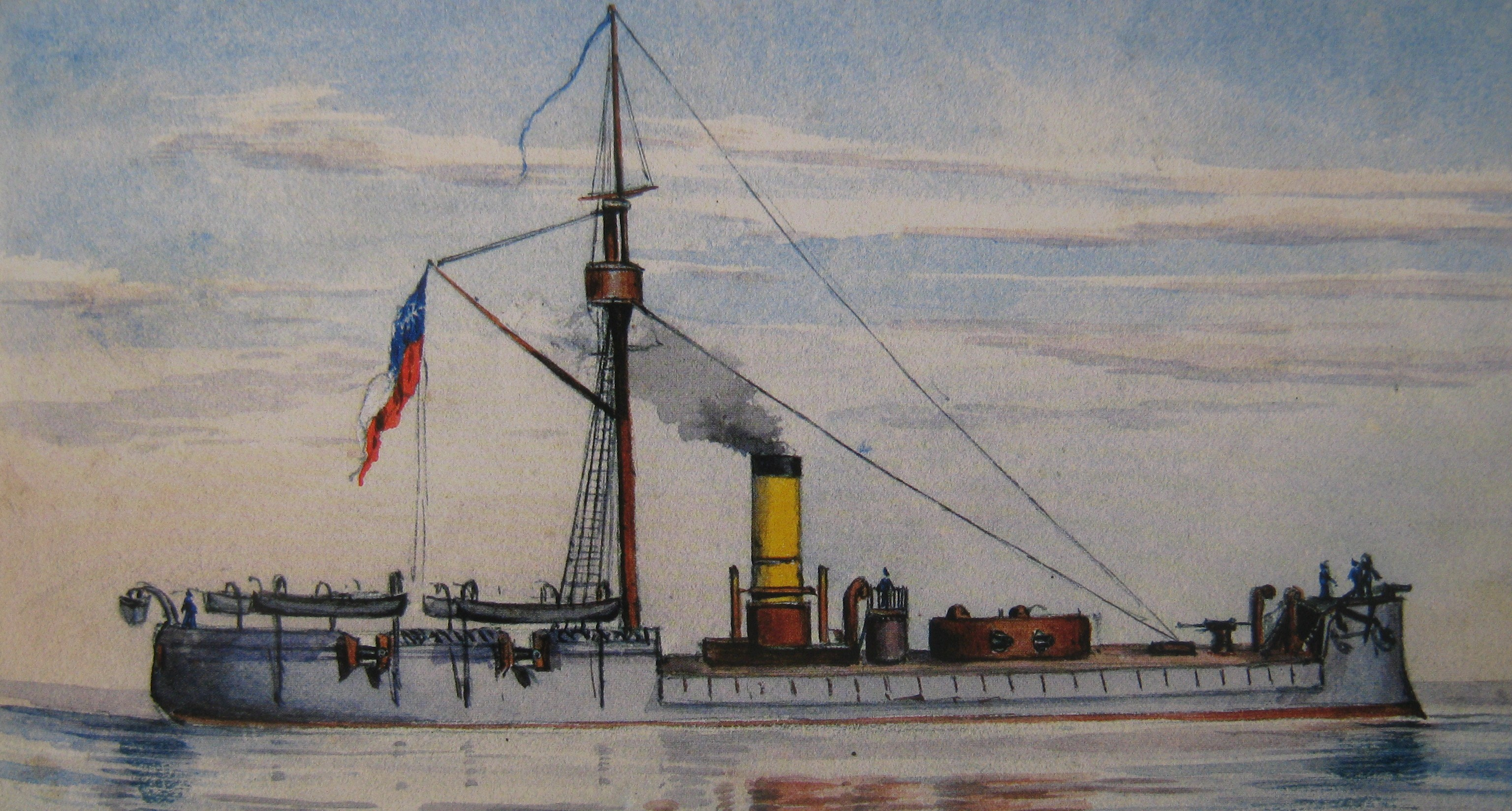 El Huascar en la armada de Chile, 1880.